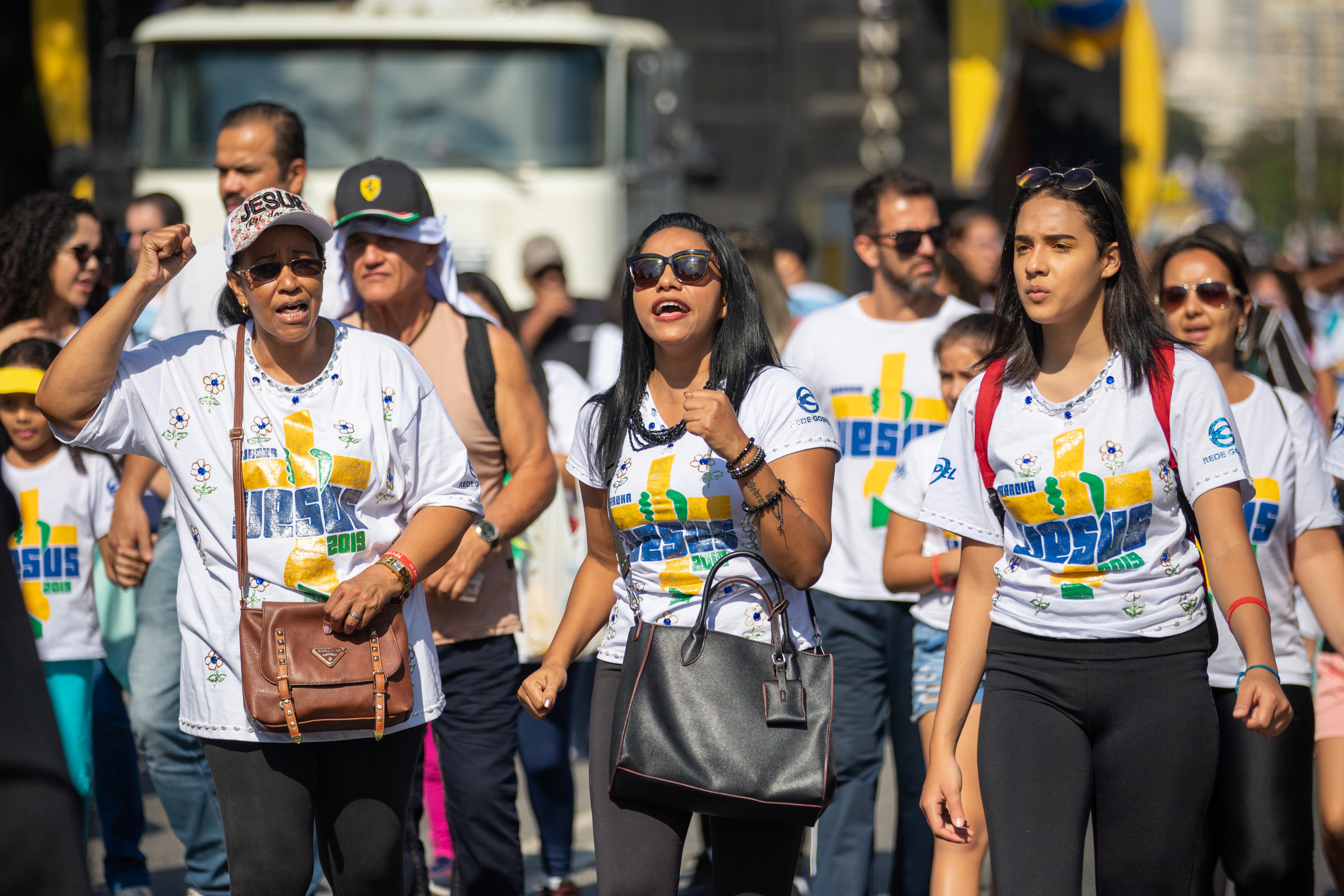 O governador do Estado de São Paulo, João Doria, participa da Marcha para Jesus em São Paulo. Data:20/06/2019. Local: São Paulo. Foto: Governo do Estado de São Paulo